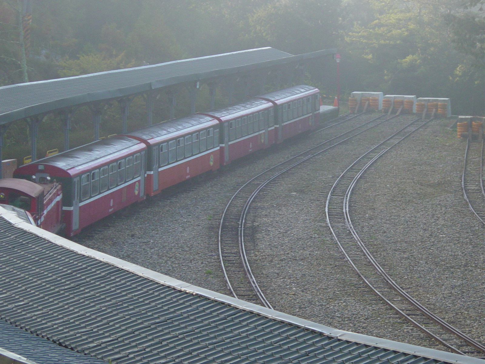 Ju Shan Station in Alisan, Taiwan 阿里山森林鐵路祝山車站